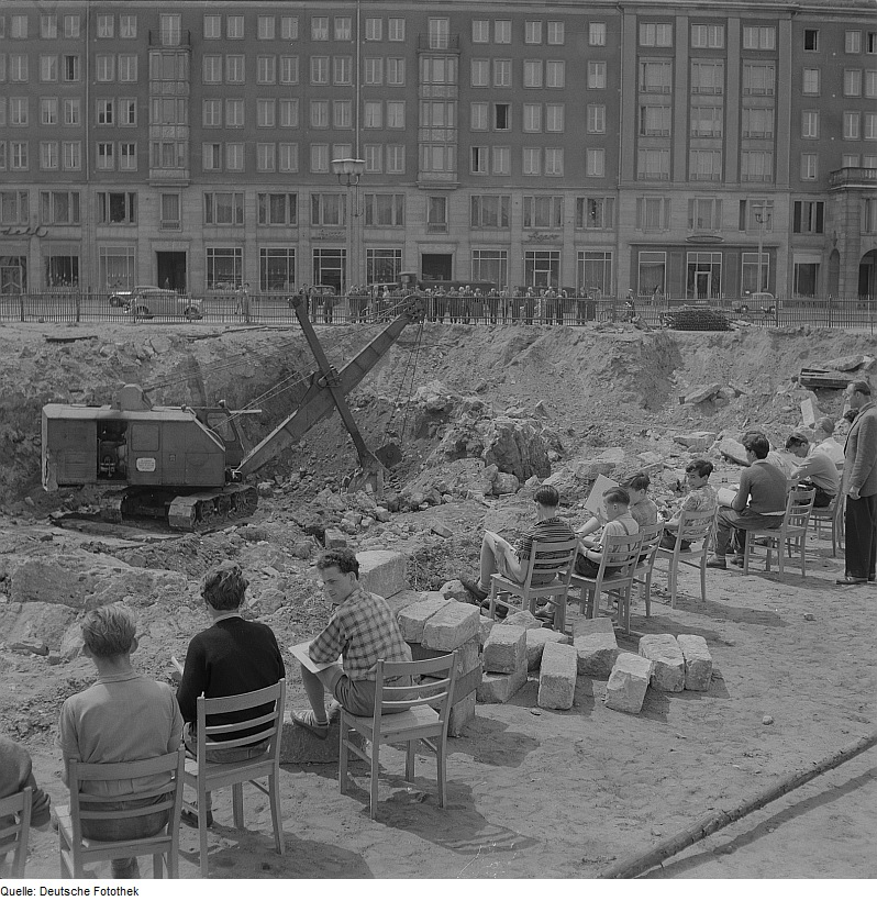 Original image description from the Deutsche FotothekSchüler zeichnen am Rande der Baugrube für die Bebauung der Ernst-Thälmann-Straße/Nordost-Seite